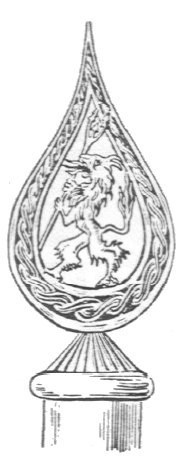 Fahnenspitze der Kroatischen Legion